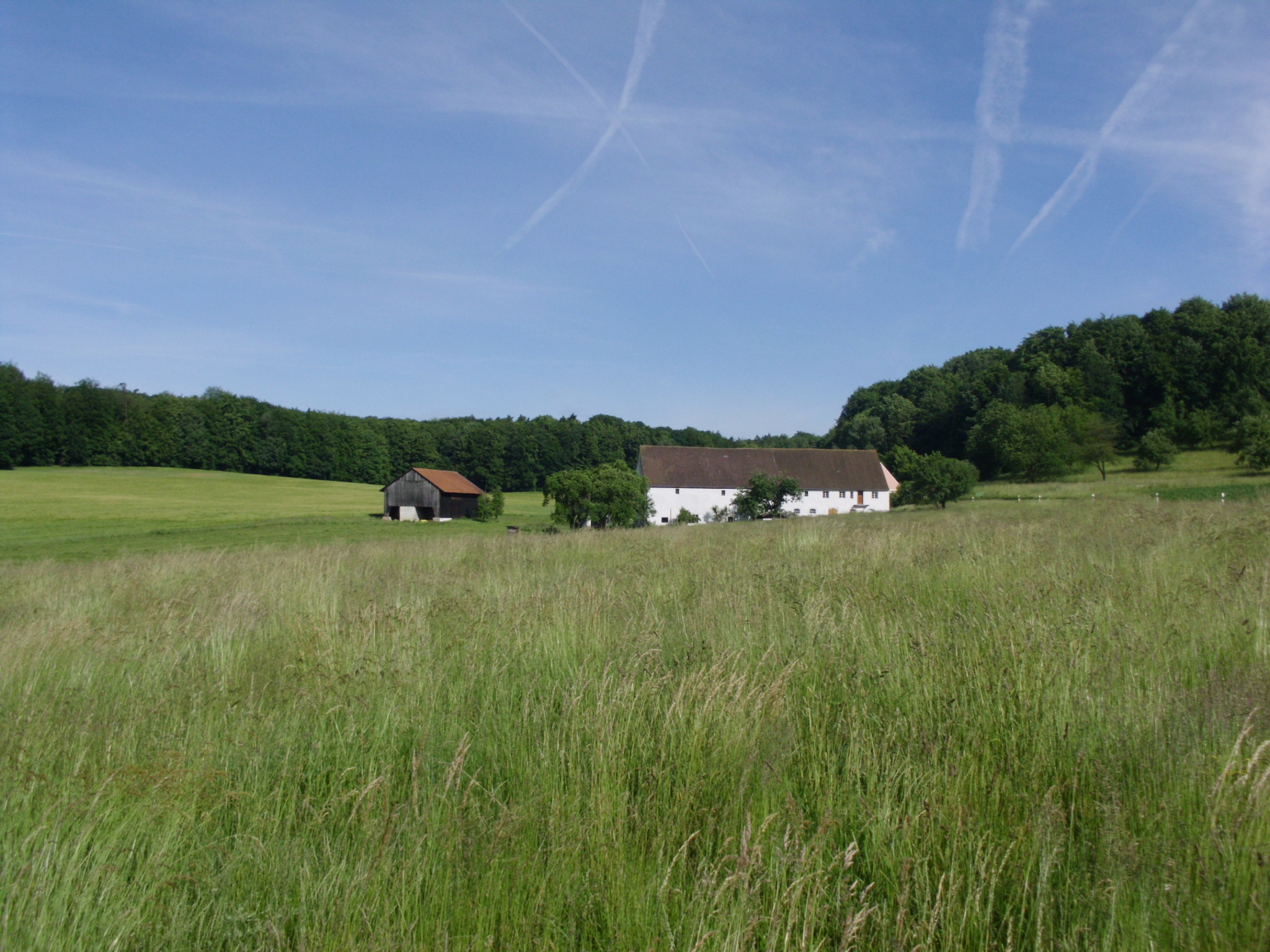 Obelshof, Ortsteil von Heidenheim im mittelfränkischen Landkreis Weißenburg-Gunzenhausen